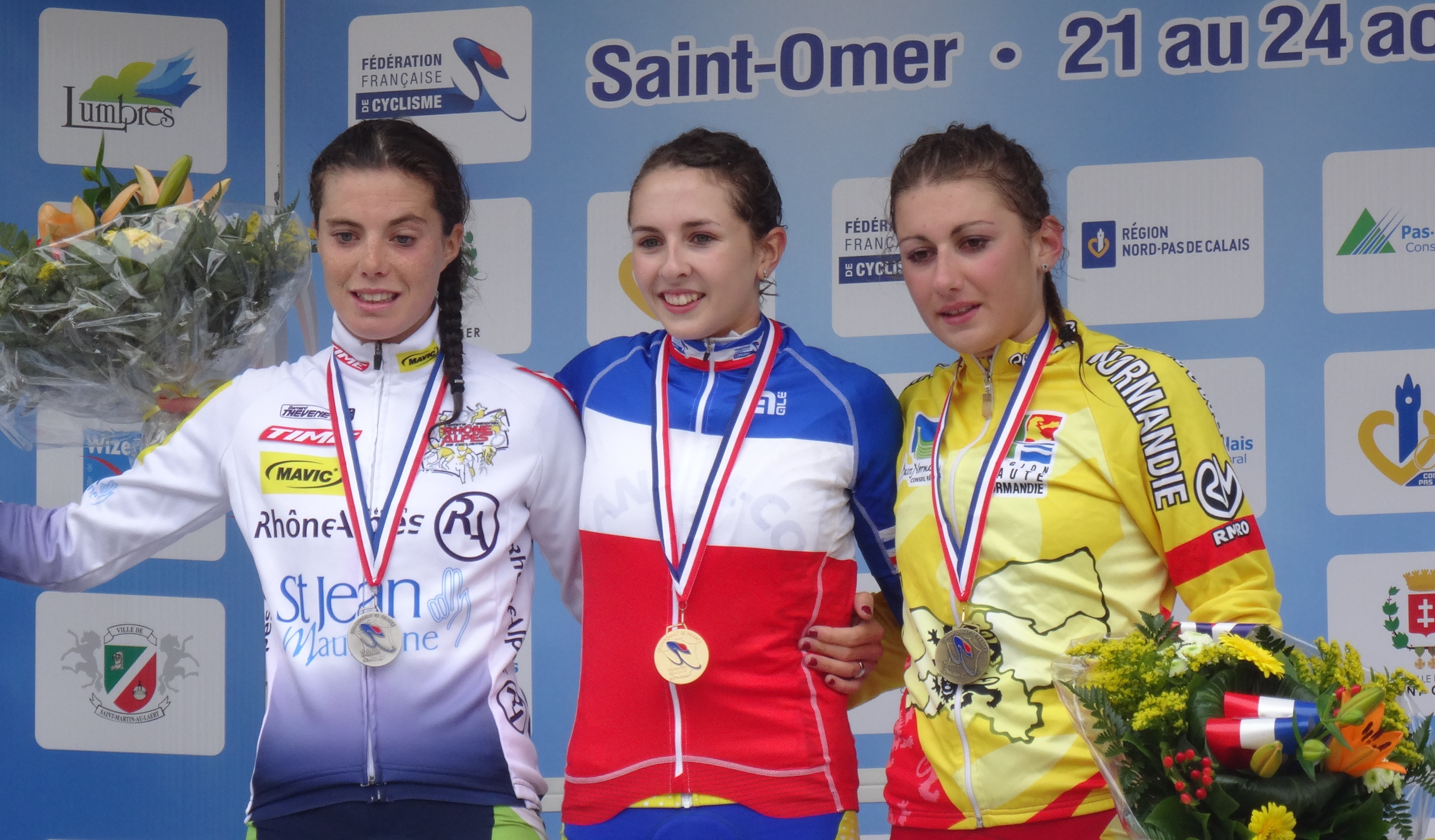 Reportage photographique réalisé le vendredi 22 août à l'occasion des Championnats de France de cyclisme sur route 2014 à Saint-Omer, Pas-de-Calais, Nord-Pas-de-Calais, France. La série A concerne le championnat de France de course en ligne cadettes, et la série B la remise des prix aux cadettes.